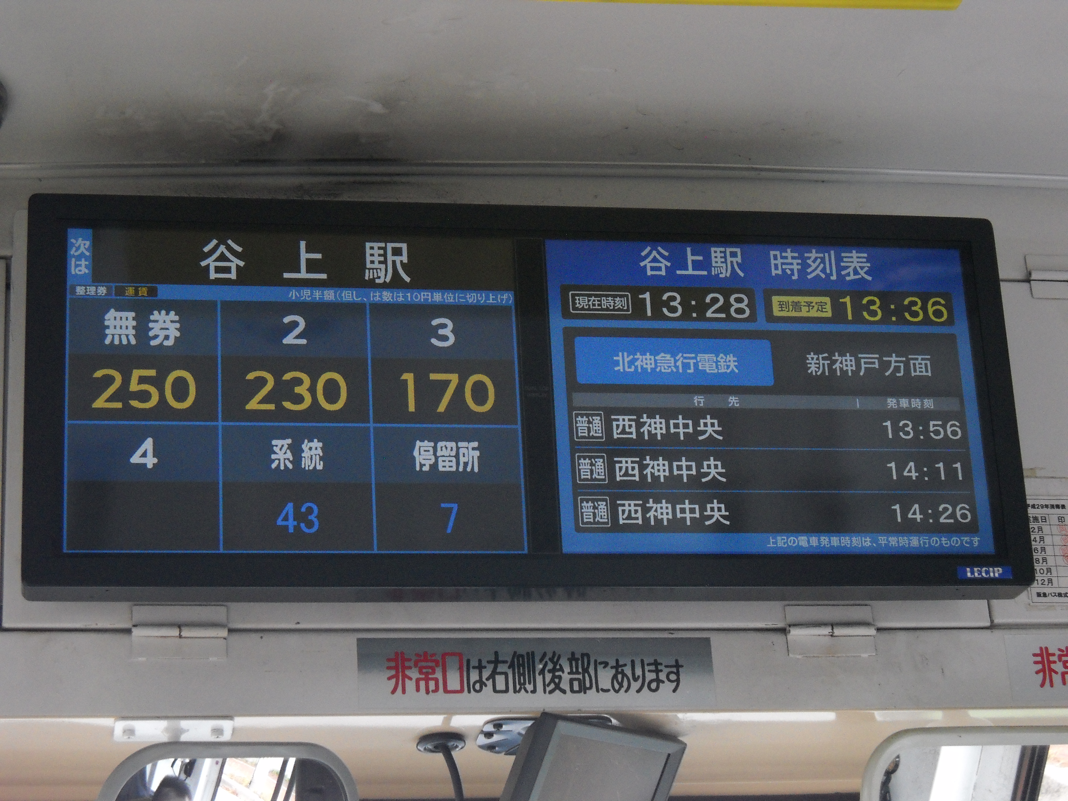 阪急バス唐櫃営業所のバス車内のLCD表示。鉄道の時刻を表示している。